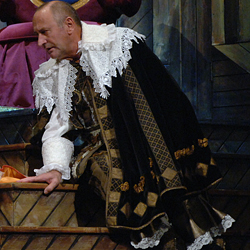 Fesztbaum Béla, Reviczky Gábor (A három testőr)